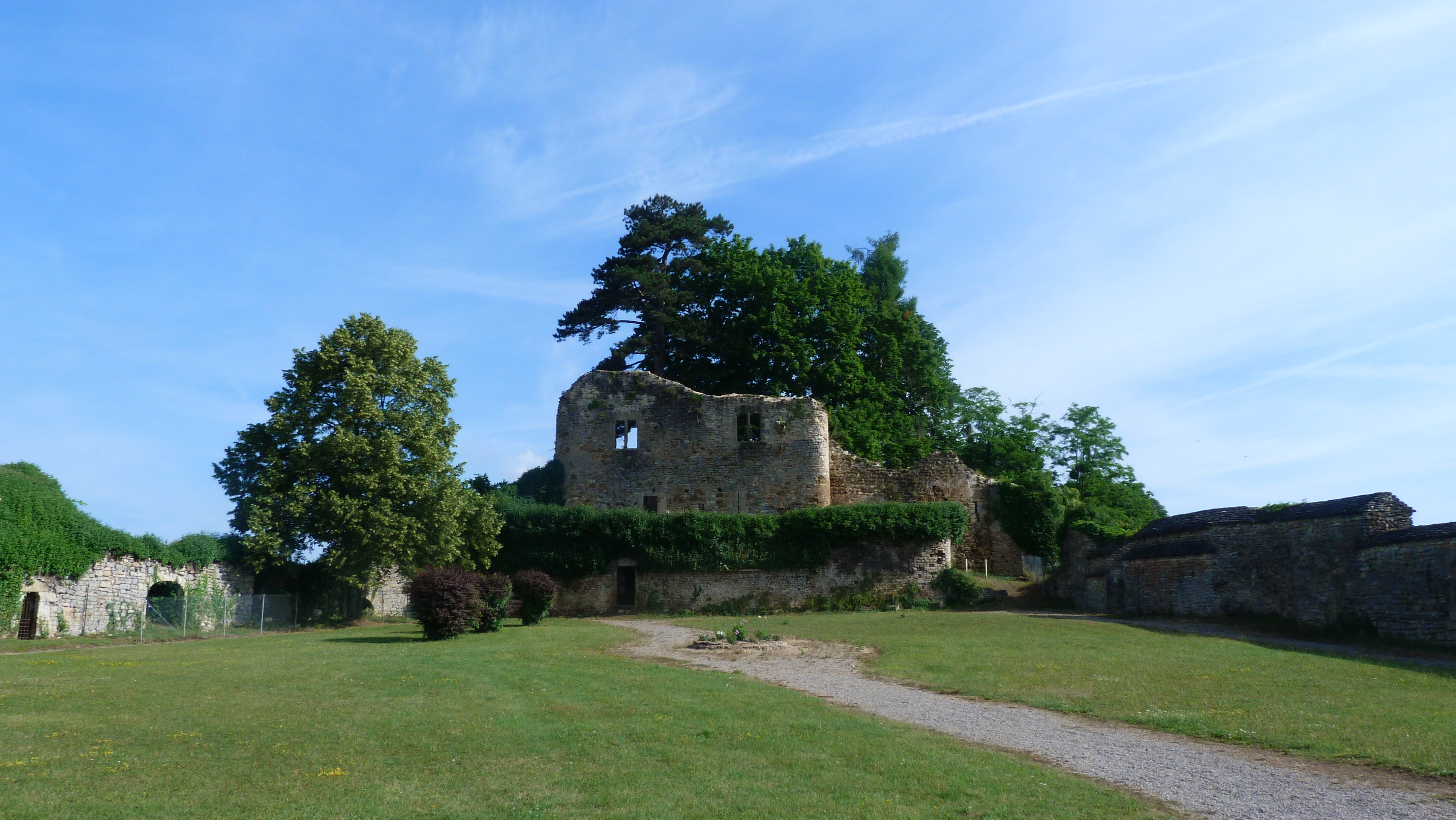 Kastelo de Moulins-Engilbert